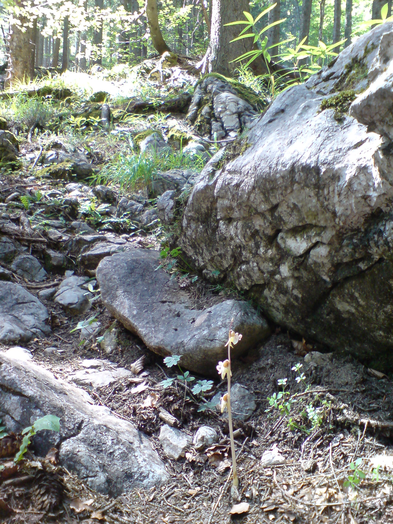 Widerbart (Epipogium aphyllum) in Bad Reichenhall; Pflanzenhöhe: 21 cm